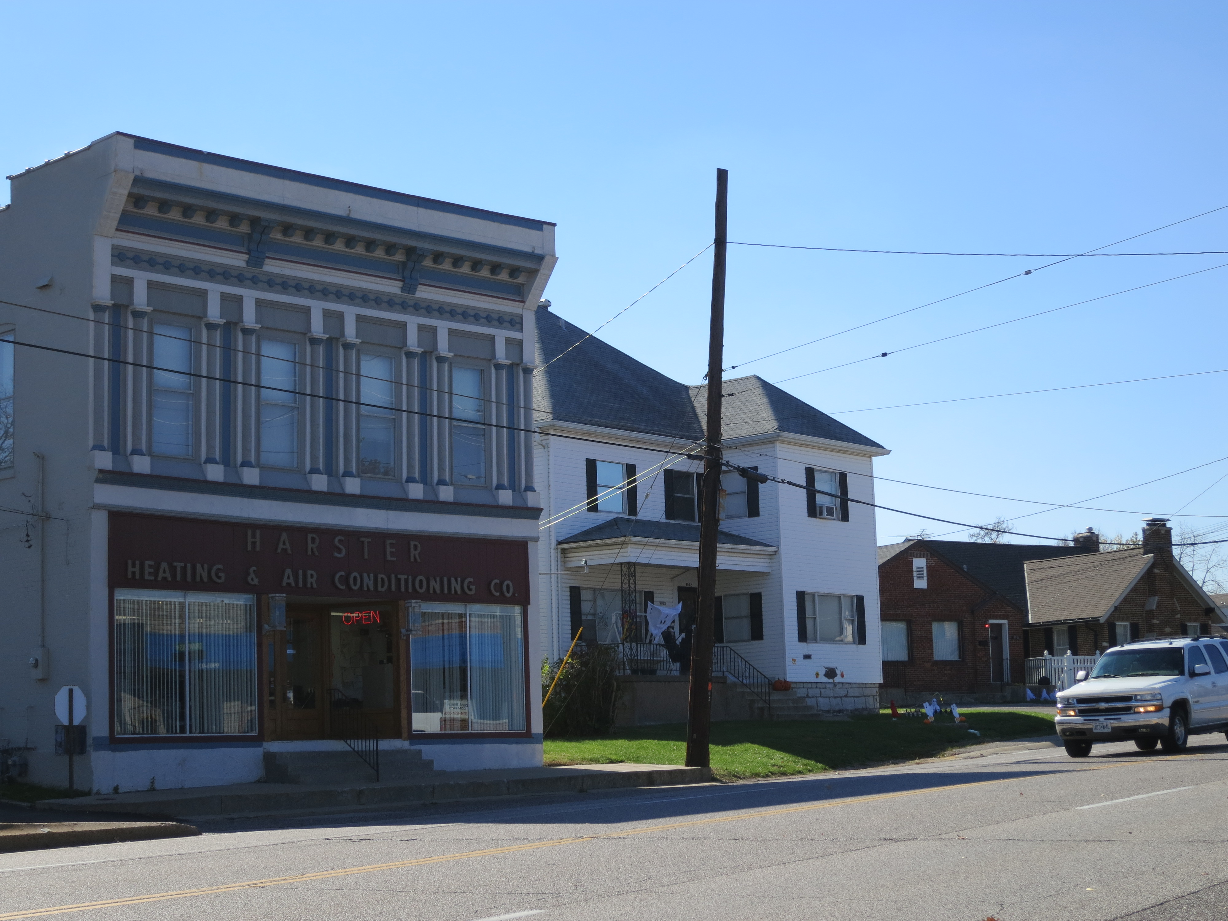 PRO Paul Sableman Harster (2) Mesker in Affton, MO